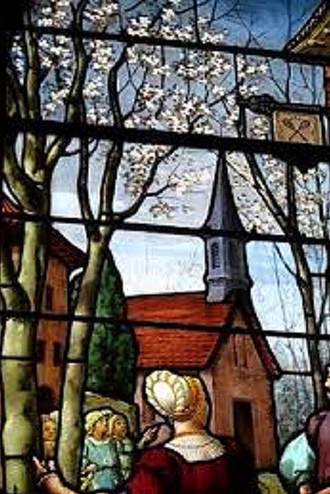 Notre-Dame-des-Fleurs de Villembray